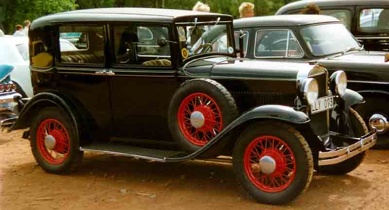 Opel 1,8 Liter Serie 18 B 4-Door Limousine 1931